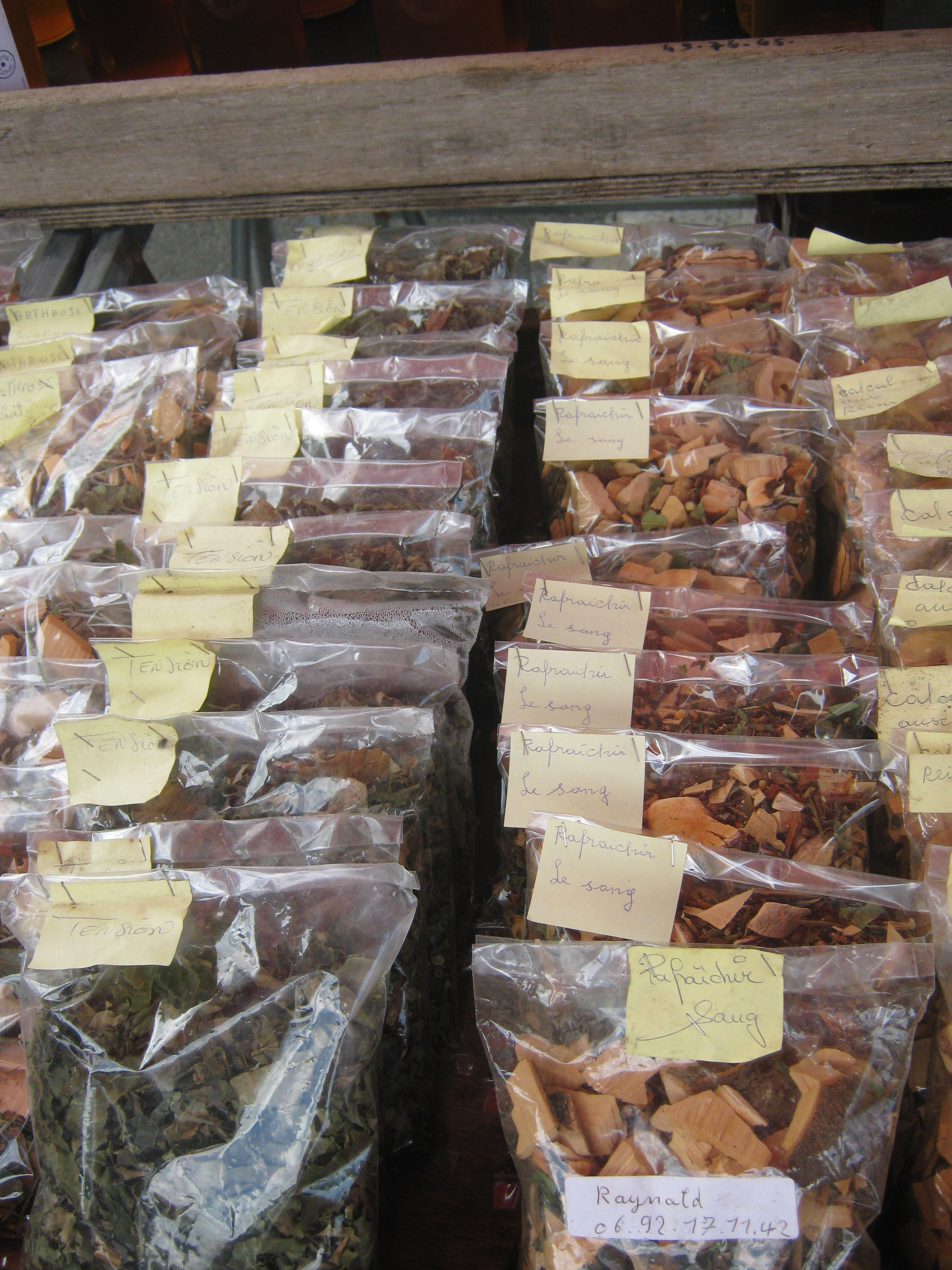 On peut voir sur cette image les noms des plantes utilisées, qui sont ici séchées et mises en sachet, pour la vente.